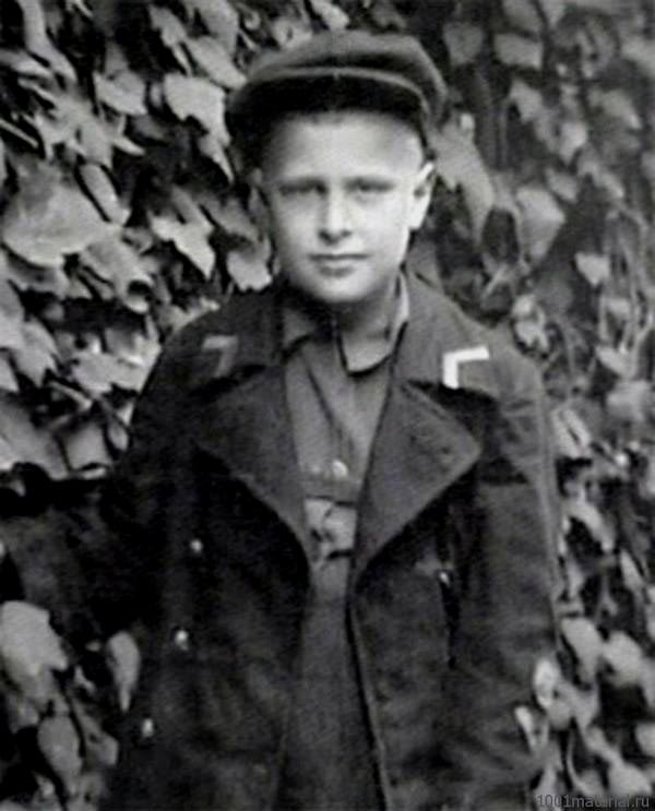 Олег Басилашвили в детстве.